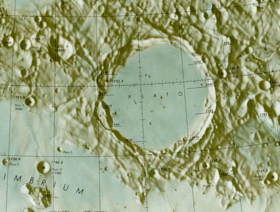 1:000 000 scale lunar chart